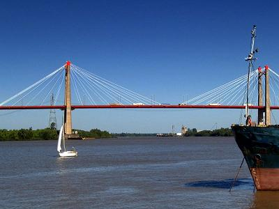 Primer puente del complejo ferrovial Zárate Brazo Largo.